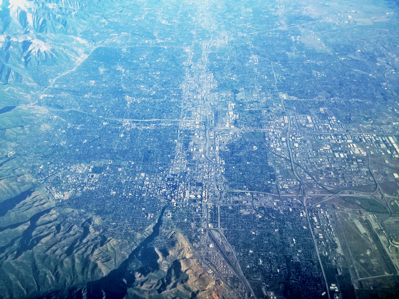 Salt Lake City 2013-06-08